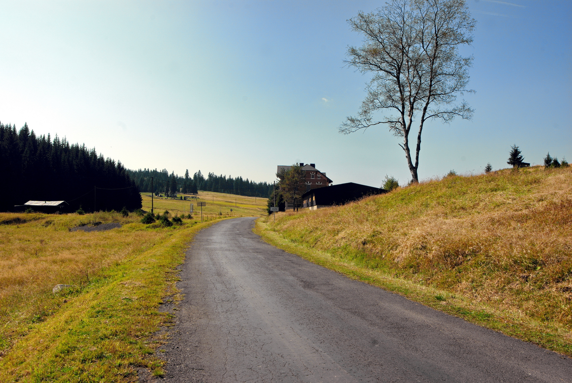 Zaniklá obec Jelení, Krušné hory, okres Karlovy Vary